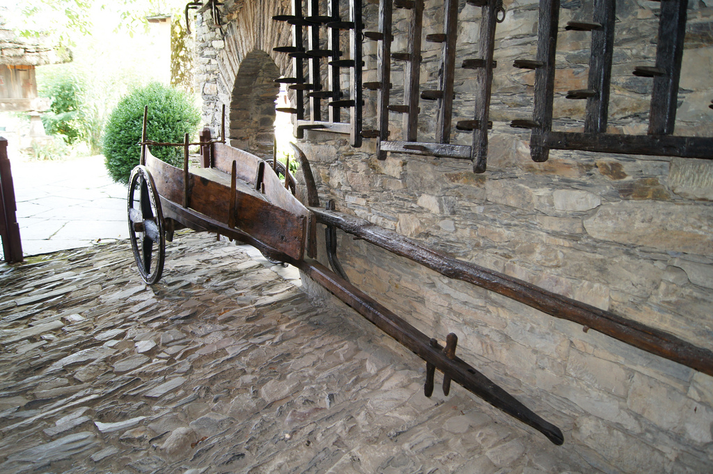 Núm. Inv. 4837. El carro del país o chillón siempre utiliza como fuerza motriz una pareja de bueyes o vacas a un xugo sujeto a los cuernos y no al cuello. Su uso estaba destinado a transportar la hierba desde el campo hasta la tenada, el cucho (estiércol) desde la cuadra hasta la tierra de labor, las patatas, etc.. Fundamentalmente estaba realizado en roble, pero otras maderas no le eran extrañas, como en el caso del eixe que podía ser de abedul, cerezo, etc. o el fresno e incluso el pino (en piezas más modernas). La denominación “chillón” es porque el eje y las ruedas forman un conjunto único y macizo que hace que giren juntos, rozando la madera del eixe con el punto de apoyo de la caja (caucilón), produciendo un peculiar y característicos chirrido penetrante. Cada carro tiene su propio “canto”, de manera que por el sonido, los vecinos podían conocer al propietario del mismo a su paso. Algunos mojaban la zona de contacto entre el rodal y la caja, para que el chillido o “canto” fuese mucho más agudo y dar la sensación que el carro iba más cargado de lo que en realidad transportaba. También, esta zona de contacto, se podía lubricar con grasa o jabón, que facilitaba el tiro del carro a la pareja de bueyes o vacas. Ethnographic Museum of Grandas de Salime Native nameMuseo Etnográfico de Grandas de SalimeLocationGrandas de Salime, Asturias , (Spain)Coordinates43° 13′ 03.9″ N, 6° 52′ 28.4″ W Established1986Web page control : Q2879455 VIAF: 262007074 LCCN: n98032370 BNE: XX254091 WorldCat institution QS:P195,Q2879455